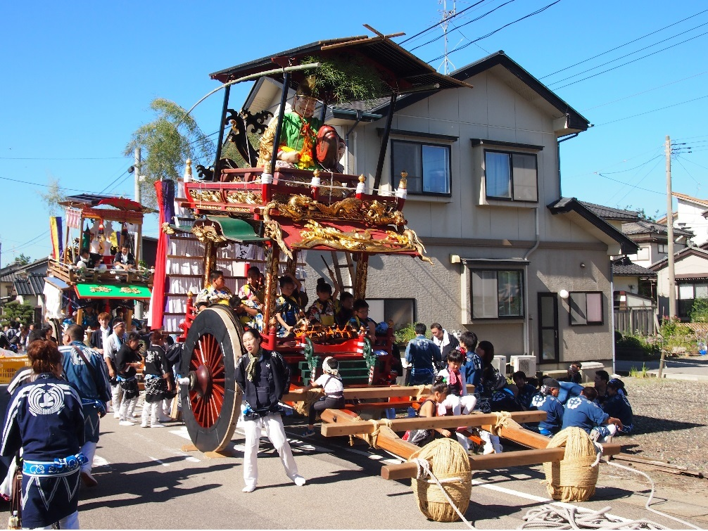 瀬波大祭 中町